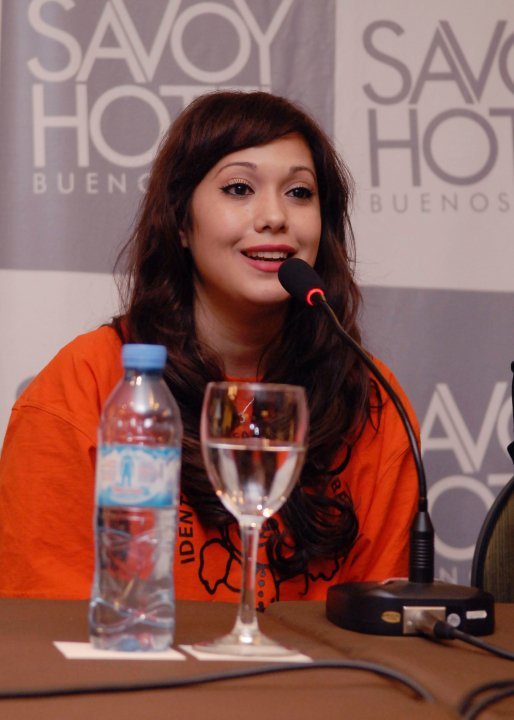 Presentación de la película Eva & Lola.